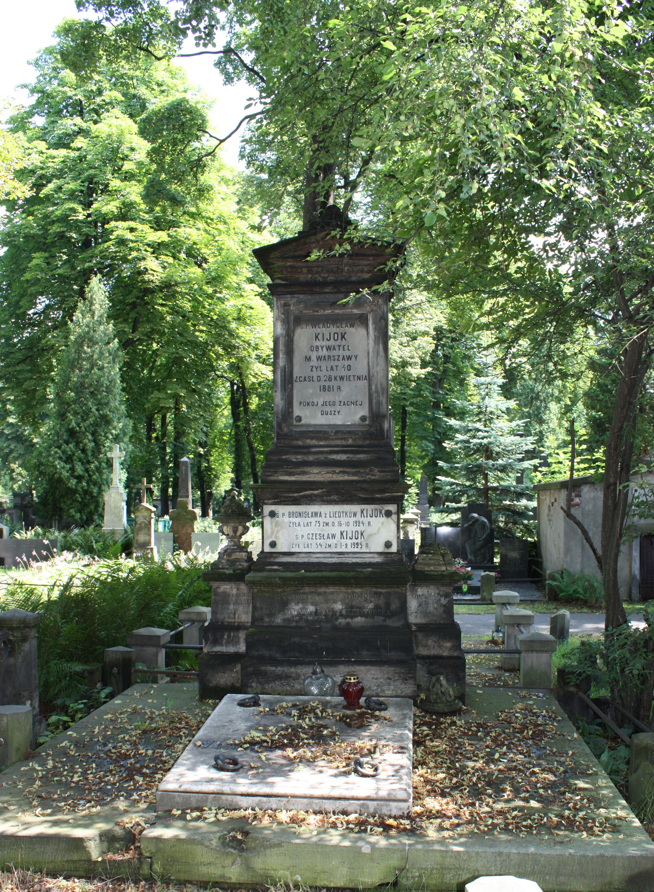 Nagrobek Władysława Kijoka, Cmentarz Ewangelicko Augsburski, Warszawa